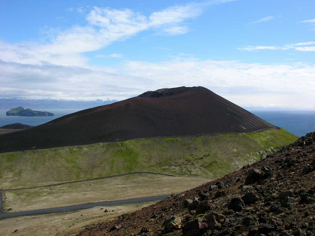 Iceland, Eldfell seen from Helgafell